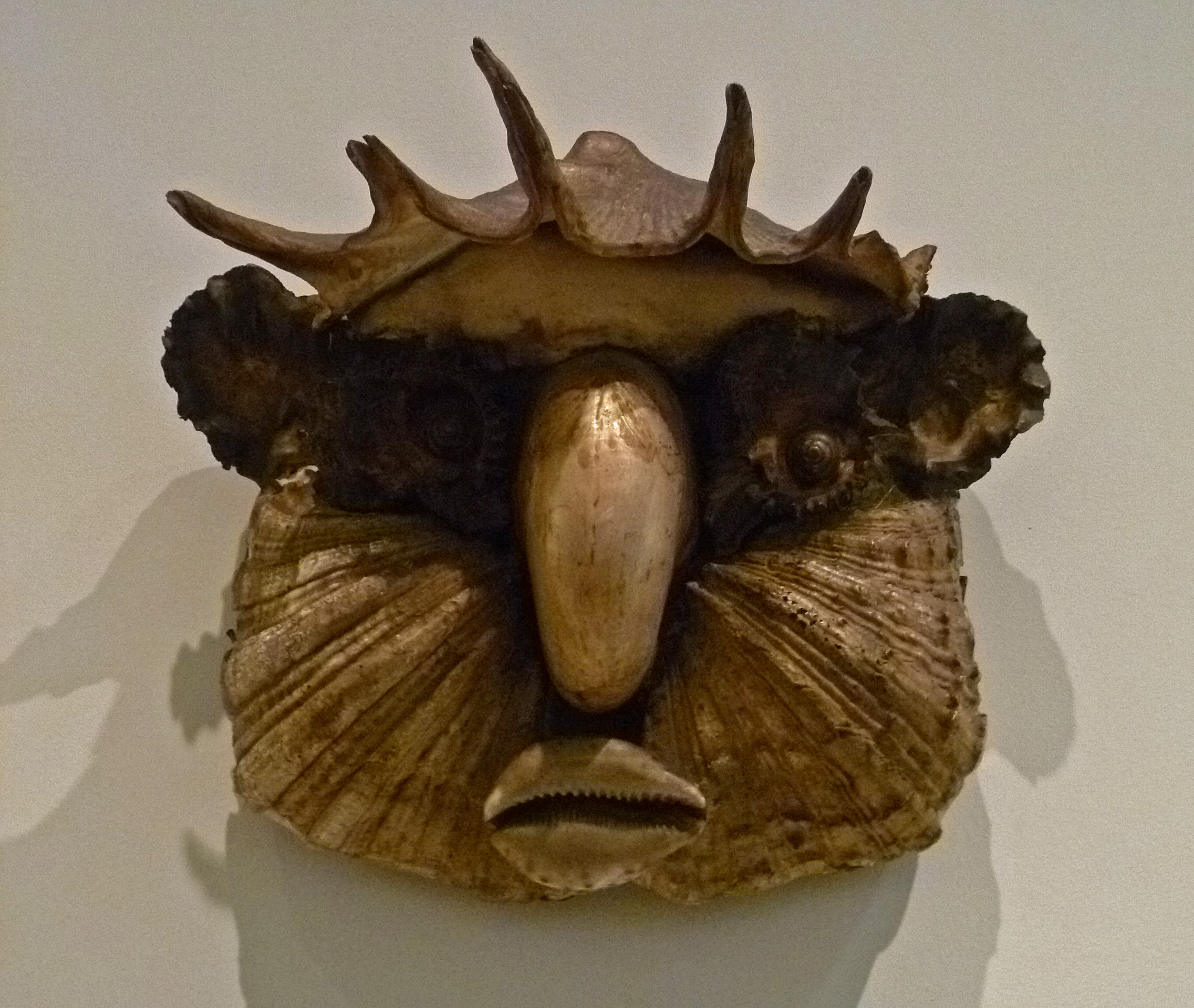 "Mask of Queen Victoria" Seashells on wood by Pascal-Désir Maisonneuve (1863-1934); Musée d'art moderne, d'art contemporain et d'art brut; Villeneuve d'Asq, France